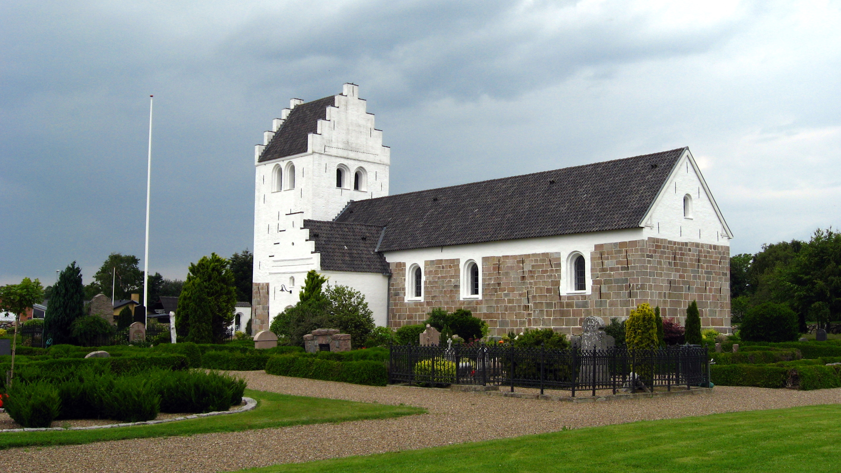 Kollerup Kirke (Jammerbugt Kommune)